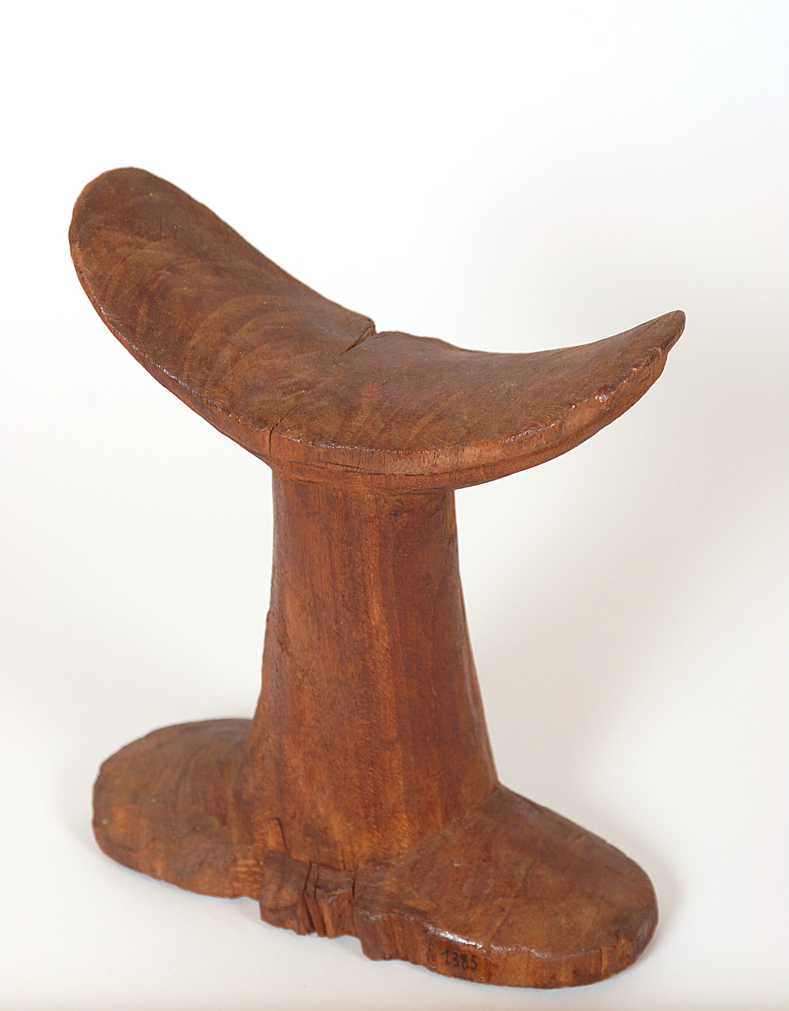 Pieza tallada en madera, usada por los egípcios para reposar la cabeza, coloca en la cabecera de la cama. Acompañaba al difunto en su sepulcro.